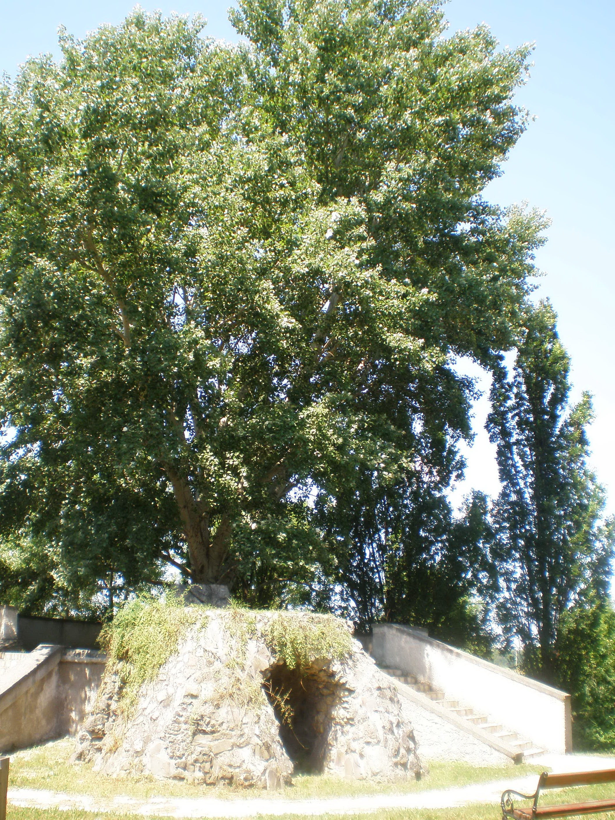 Kont-fa. A kastélytól délnyugatra mintegy 300 méterre található, Héderváry Kont István emlékét őrző szürke nyárfa (Hédervár, Győr-Moson-Sopron megye, Magyarország)